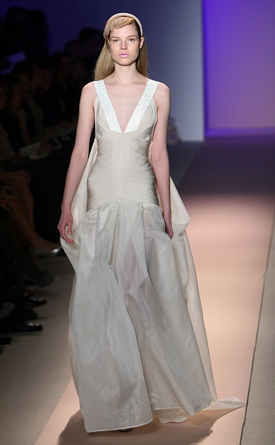 Suvi Koponen, in Herve Leger